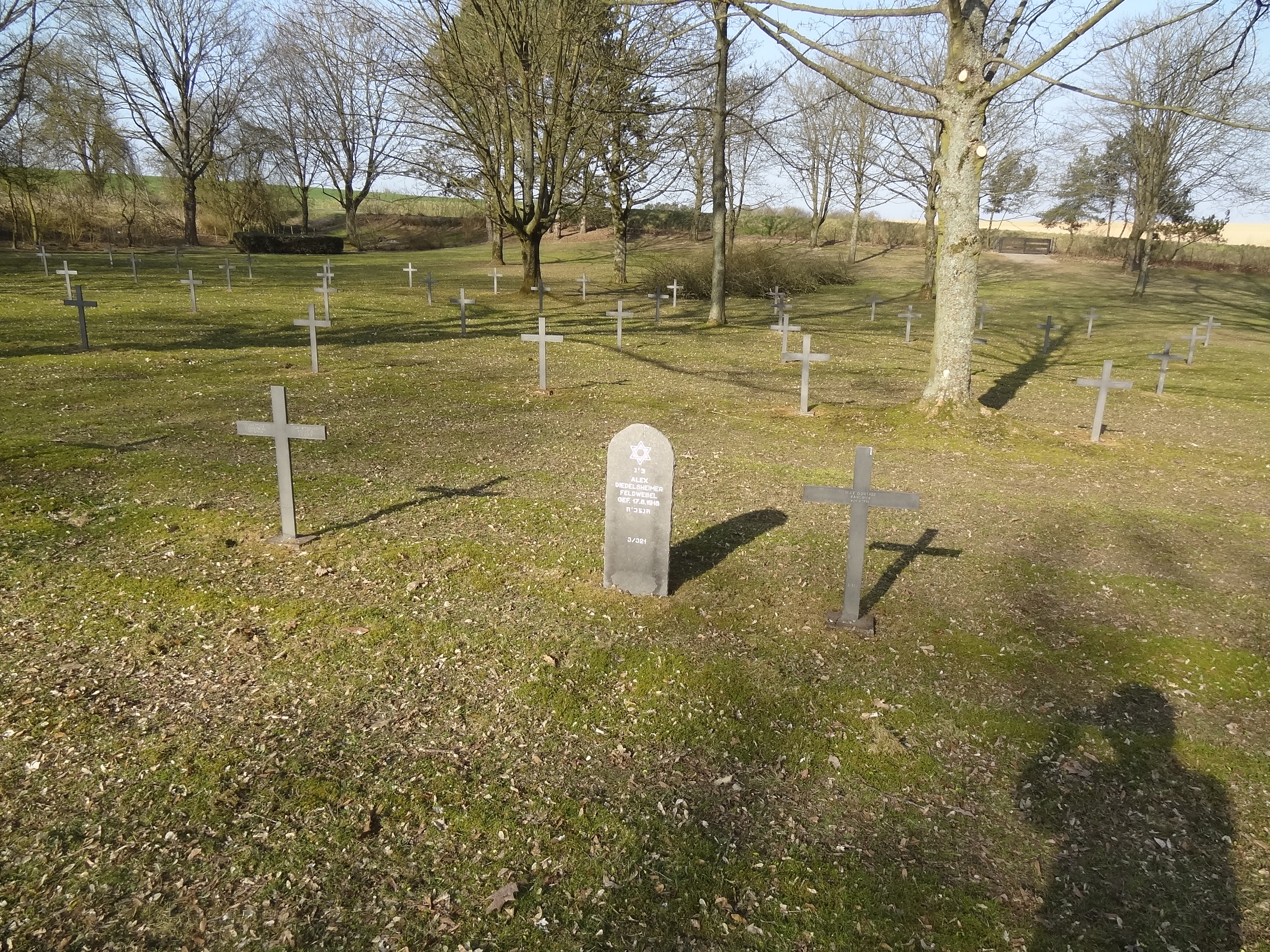 Cimetière militaire allemand de Moulin-sous-Touvent (Oise)